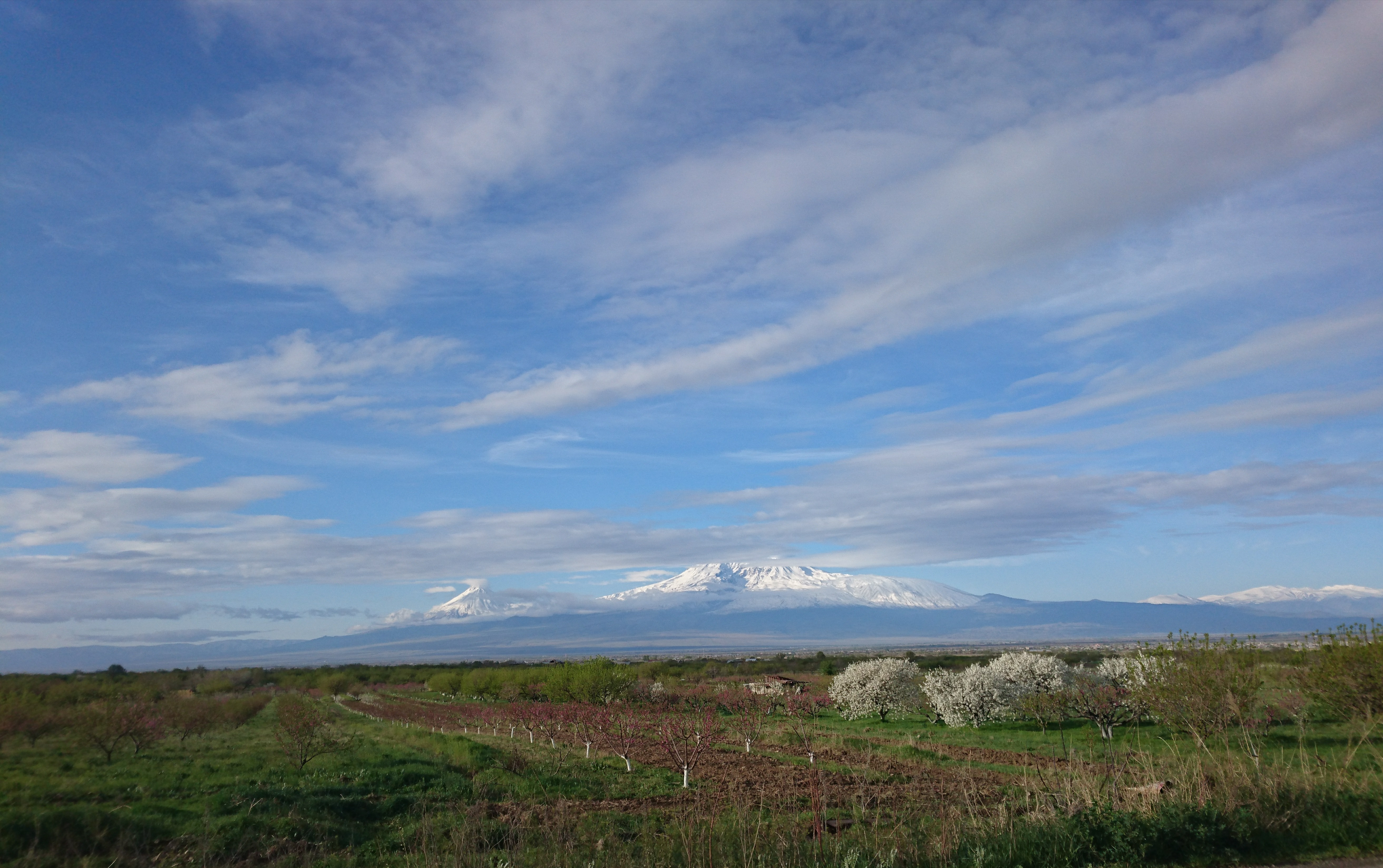 Արարատ լեռը Արևշատ (Արարատի մարզ) գյուղից